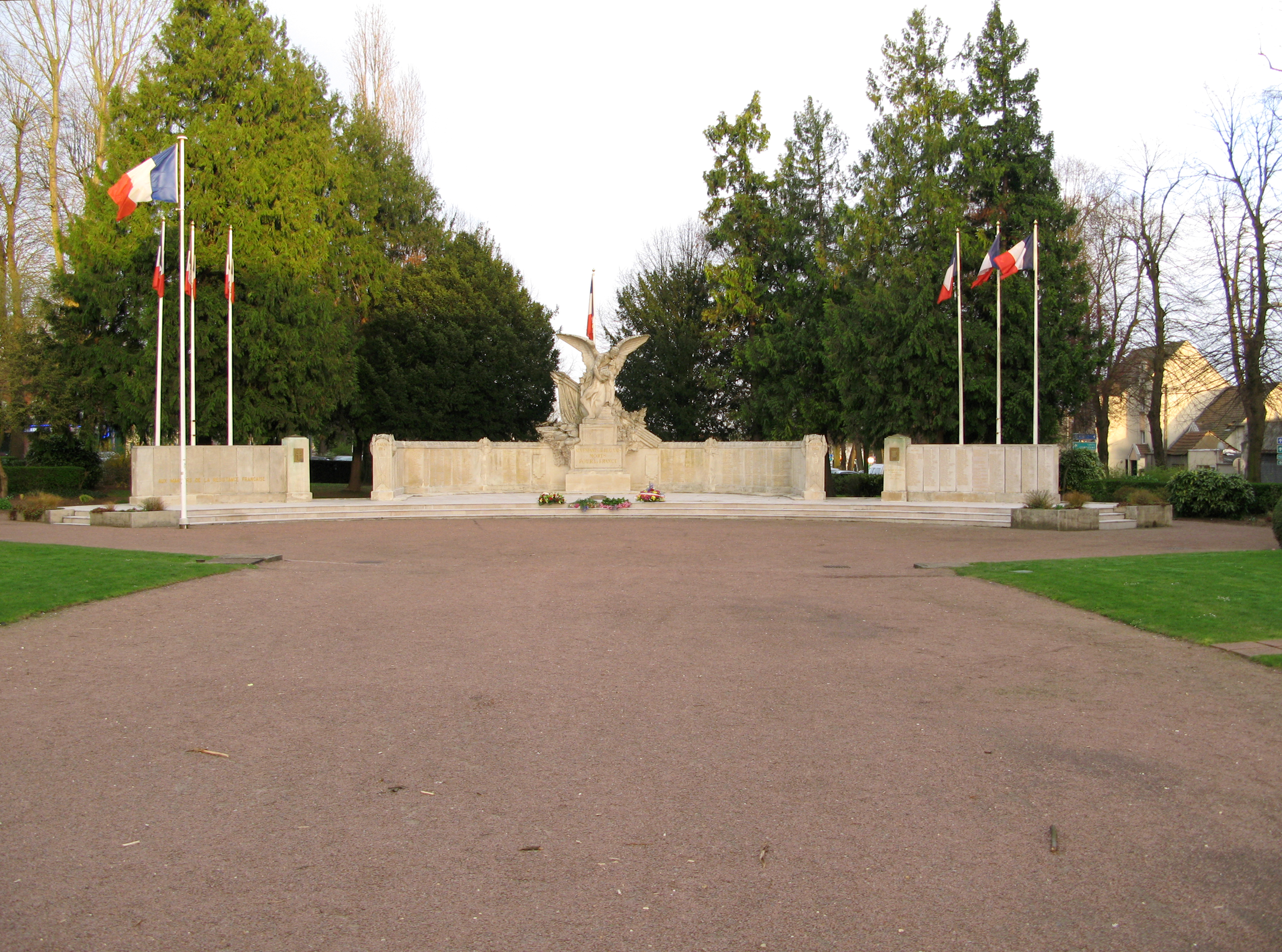 Beauvais (Oise, France) - Le Monument aux morts.